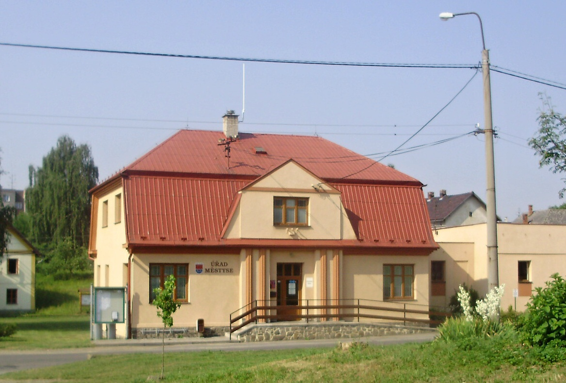 Městský úřad Suchdol nad Odrou